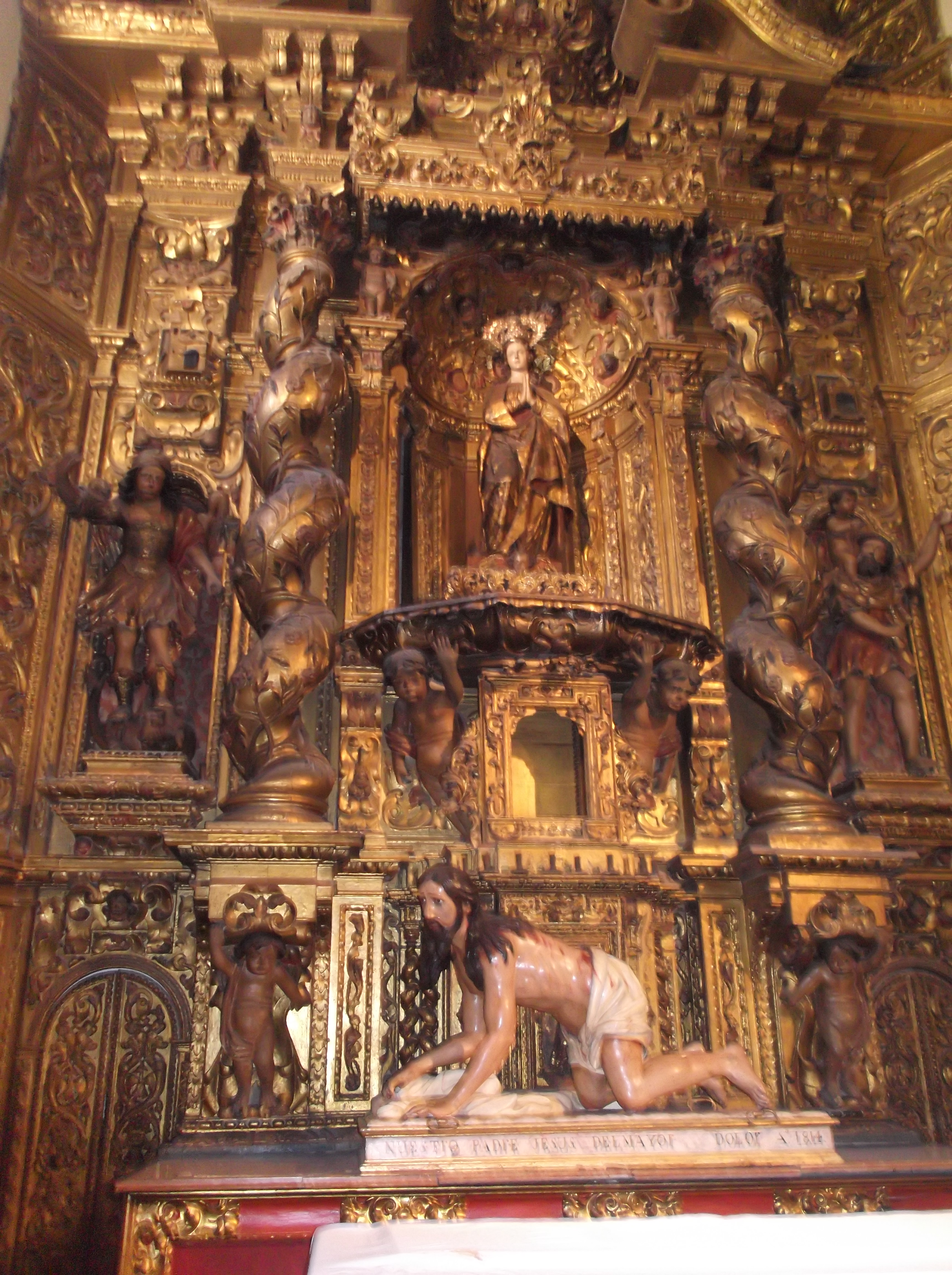 Imagen de Jesús del Mayor Dolor de la Iglesia del Hospitalito de Écija